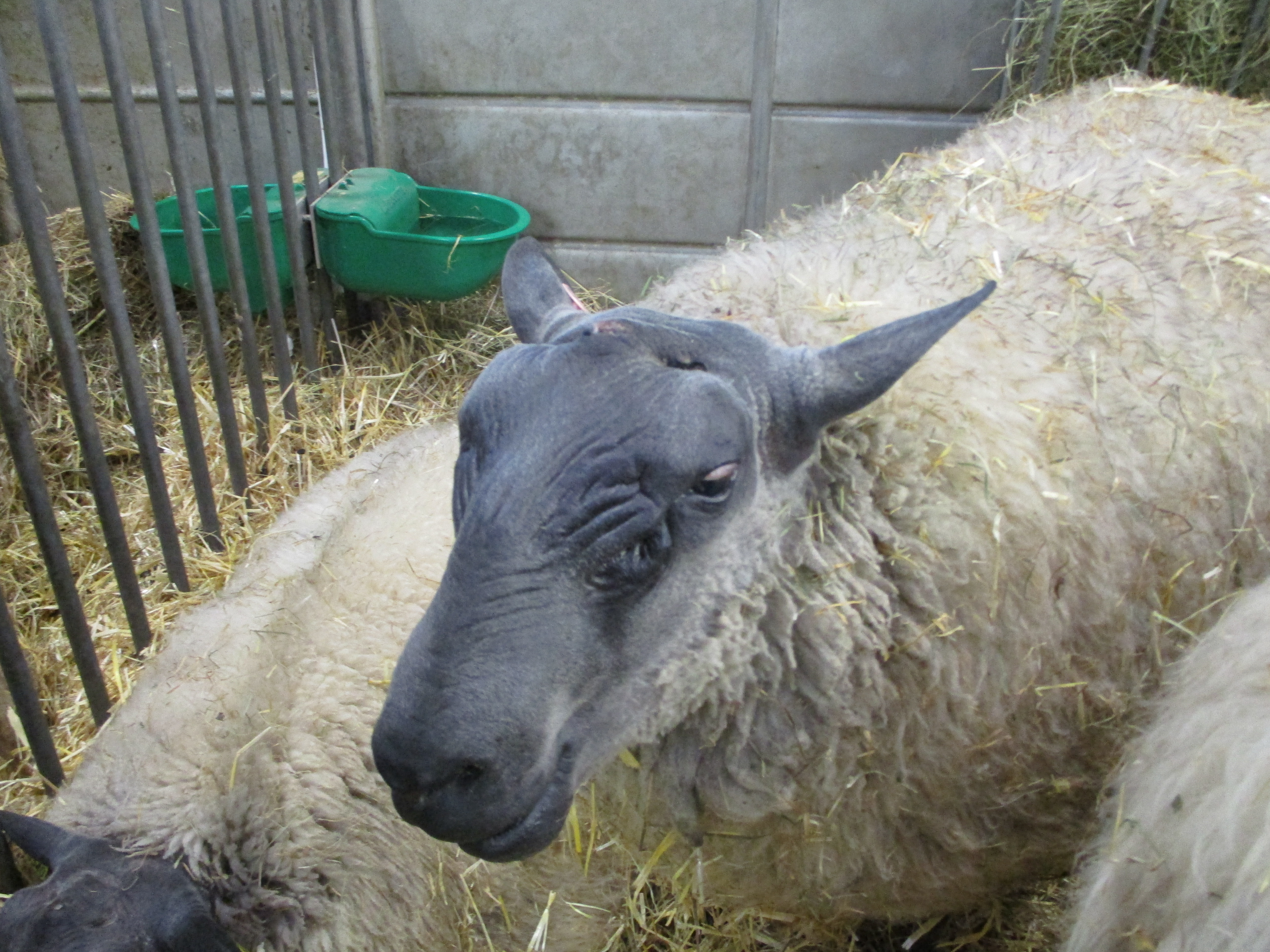 Mouton bleu du Maine au SIA 2019.